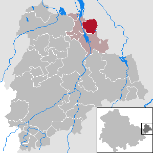 Fockendorf in Thuringia - District Altenburger Land